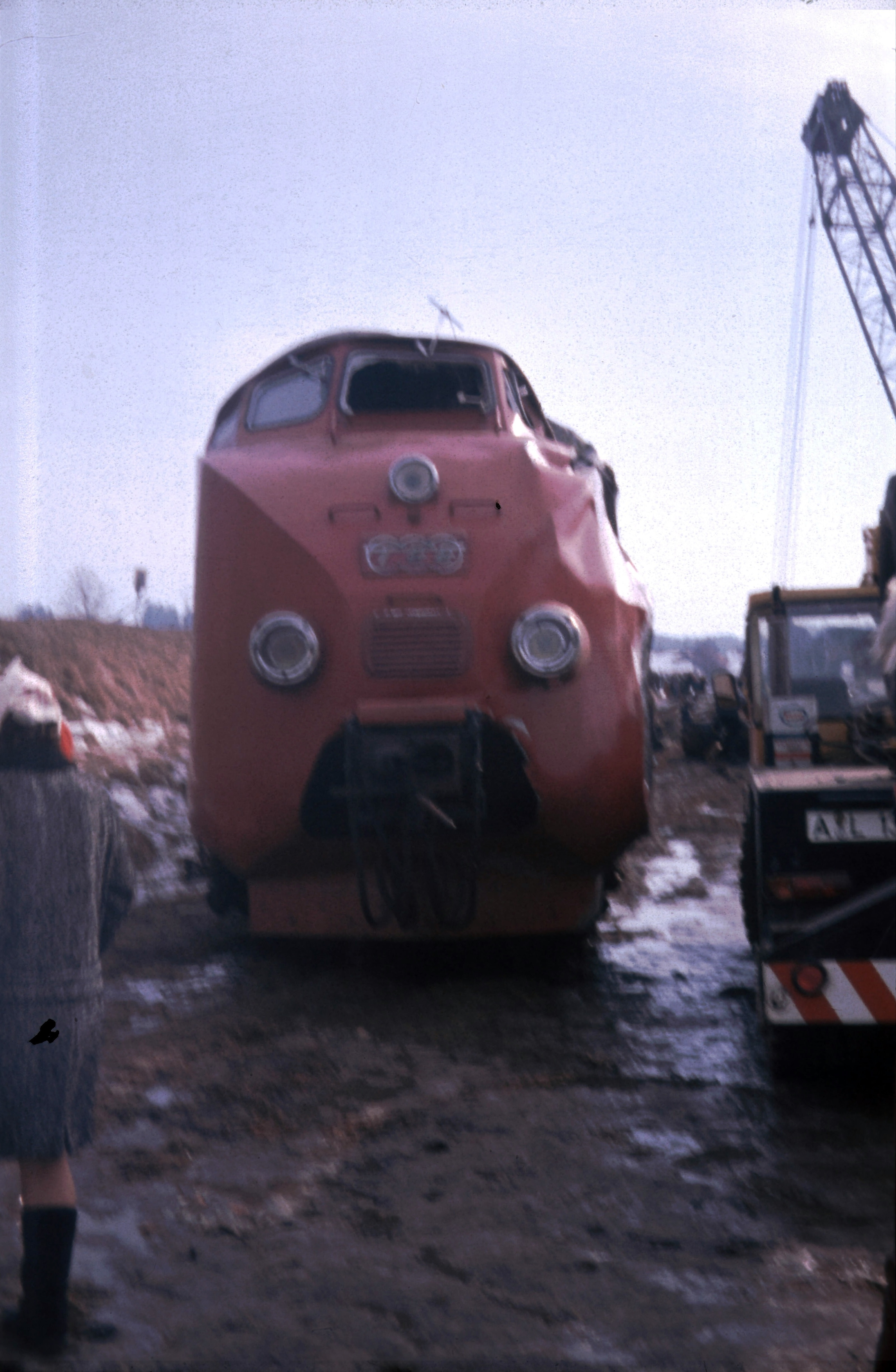 Zugunglück von Aitrang, Bergungsarbeiten, Triebwagen